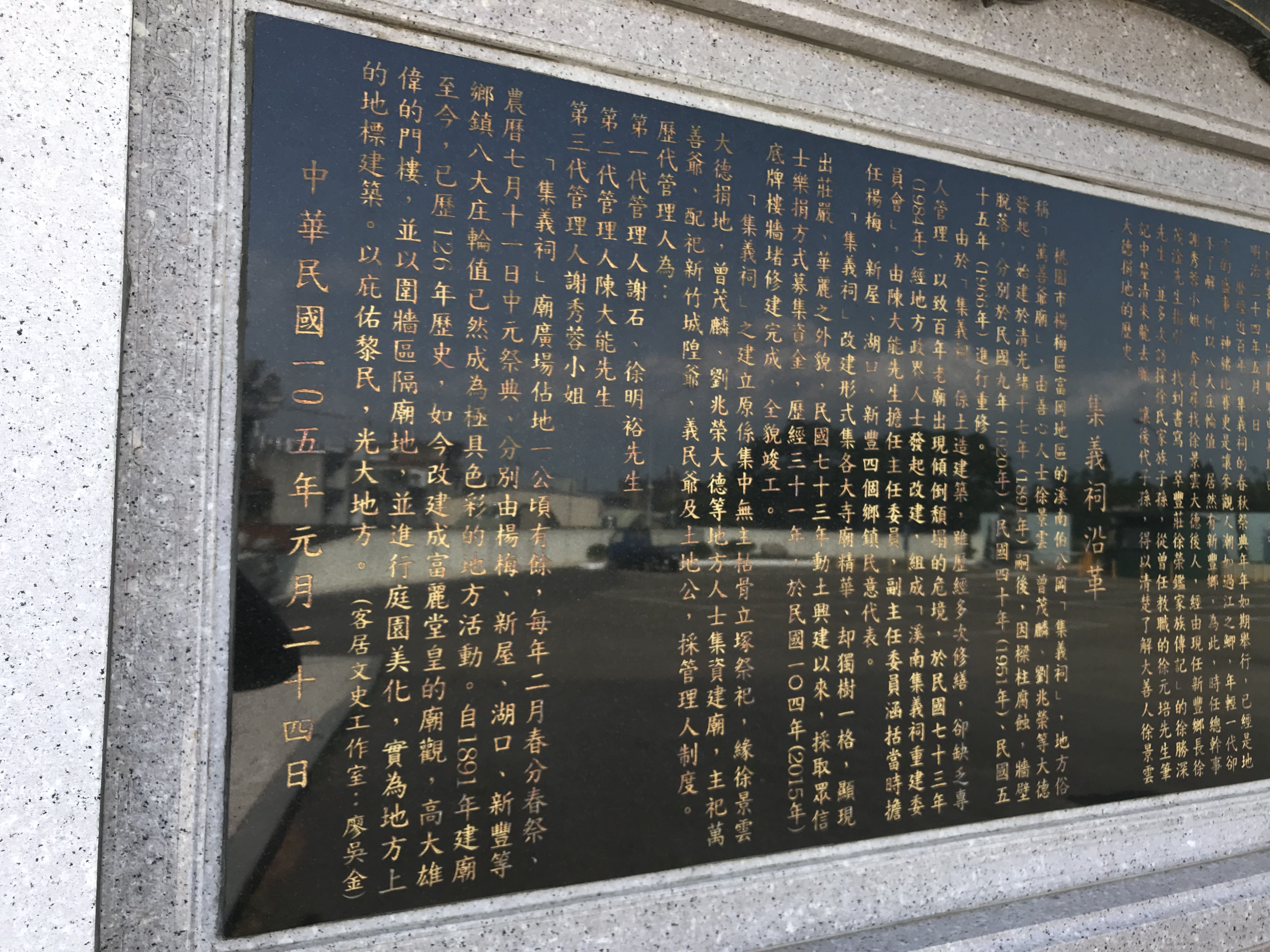 集義祠沿革